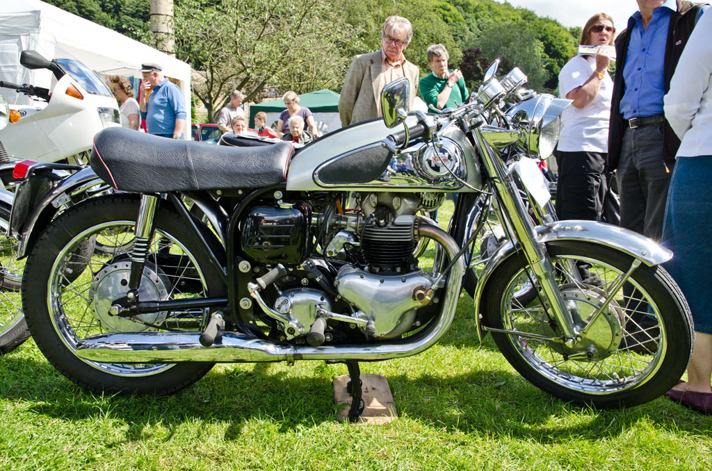 Hebden Bridge Vintage Weekend 05/08/2012